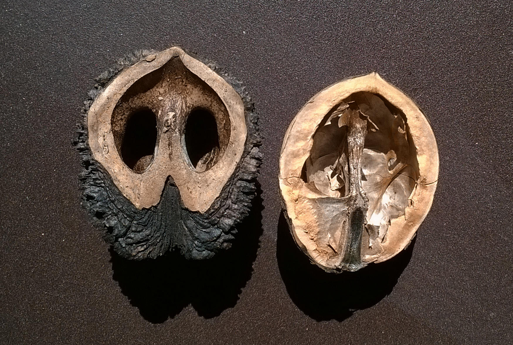 Des deux noix, la noix d’Amérique (Juglans nigra), à gauche, a la coquille la plus dure. De plus, ses parois internes sont elles aussi très dures, ce qui rend l’extraction de l’amande comestible très malaisée, par comparaison à la noix commune (Juglans regia), à droite, dont les parois internes sont fines et facilement détachables, tandis que la coque externe se sépare assez aisément en deux.